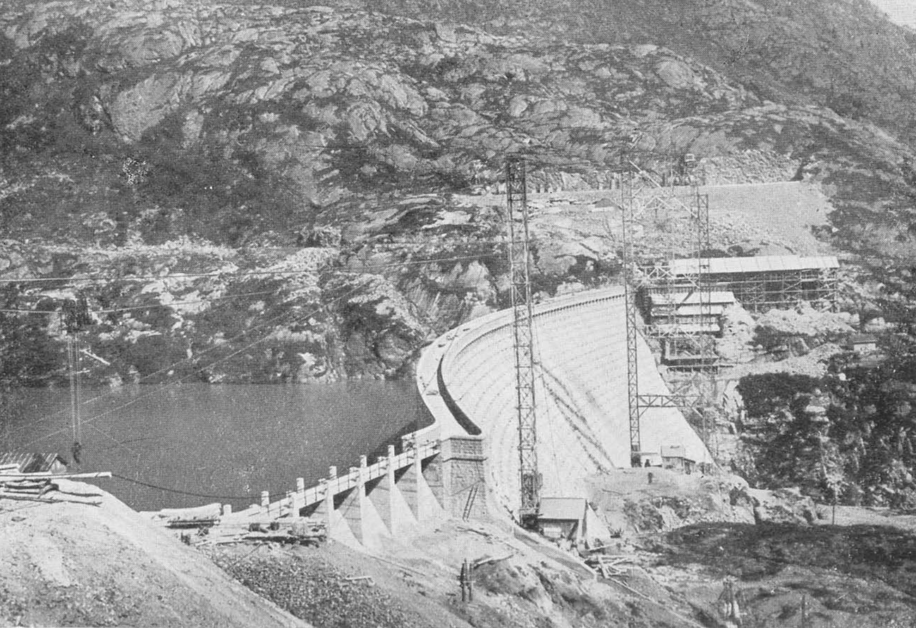 Barrage de Barberine